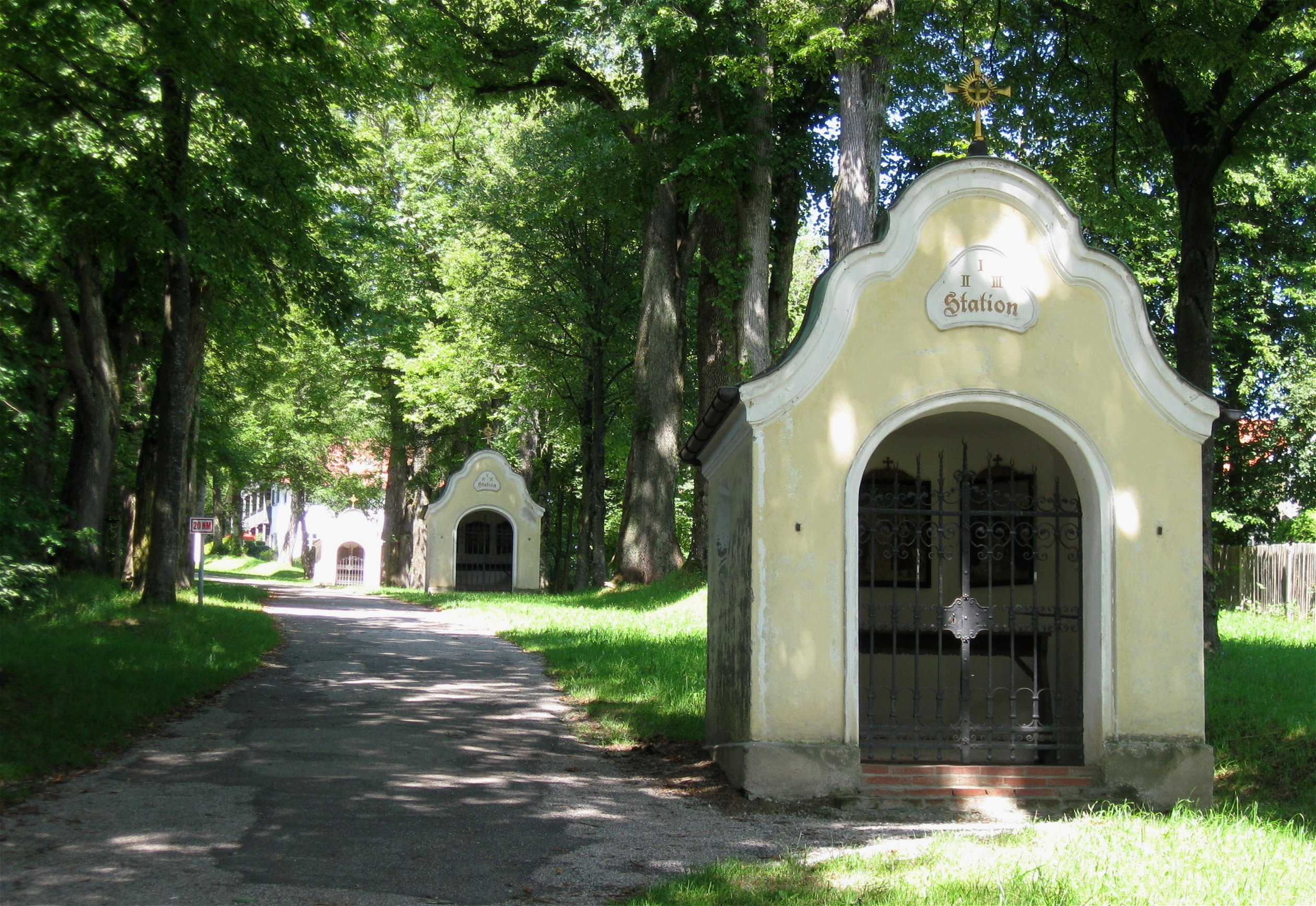 Kreuzwegstationskapelle I/II/III, auf dem Kalvarienberg, Bad Tölz